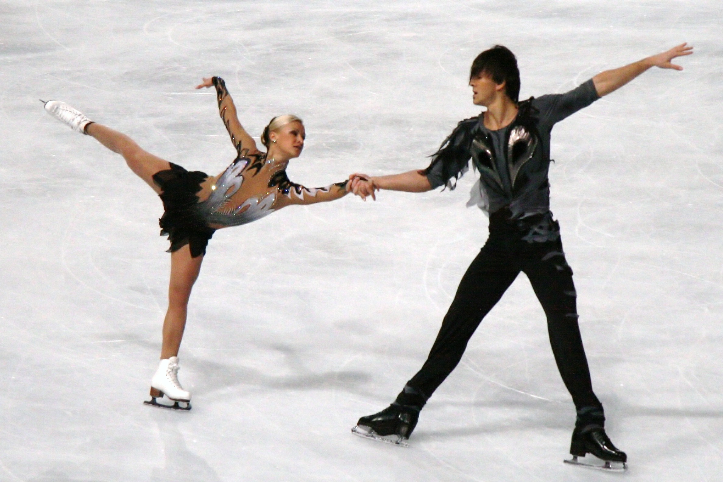 Татьяна Волосожар и Максим Траньков на 2011 Trophée Eric Bompard